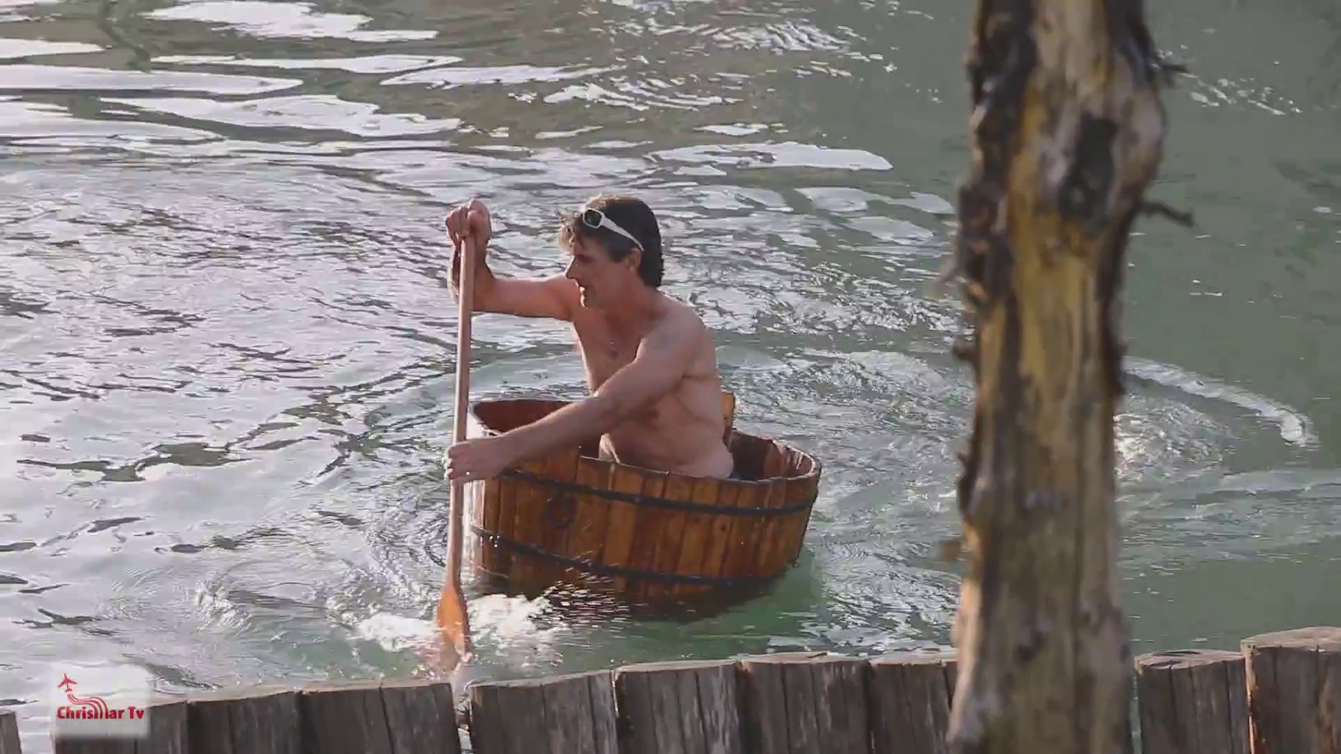 Alcuni partecipanti si allenano nelle acque del fiume Velino in vista della Festa del Sole, competizione tradizionale di Rieti (Lazio)